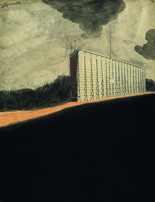 Léon Spilliaert, De loods van het luchtschip, 1910, tekening op papier met gewassen Chinese inkt – penseel en kleurkrijt, 65 x 50 cm.